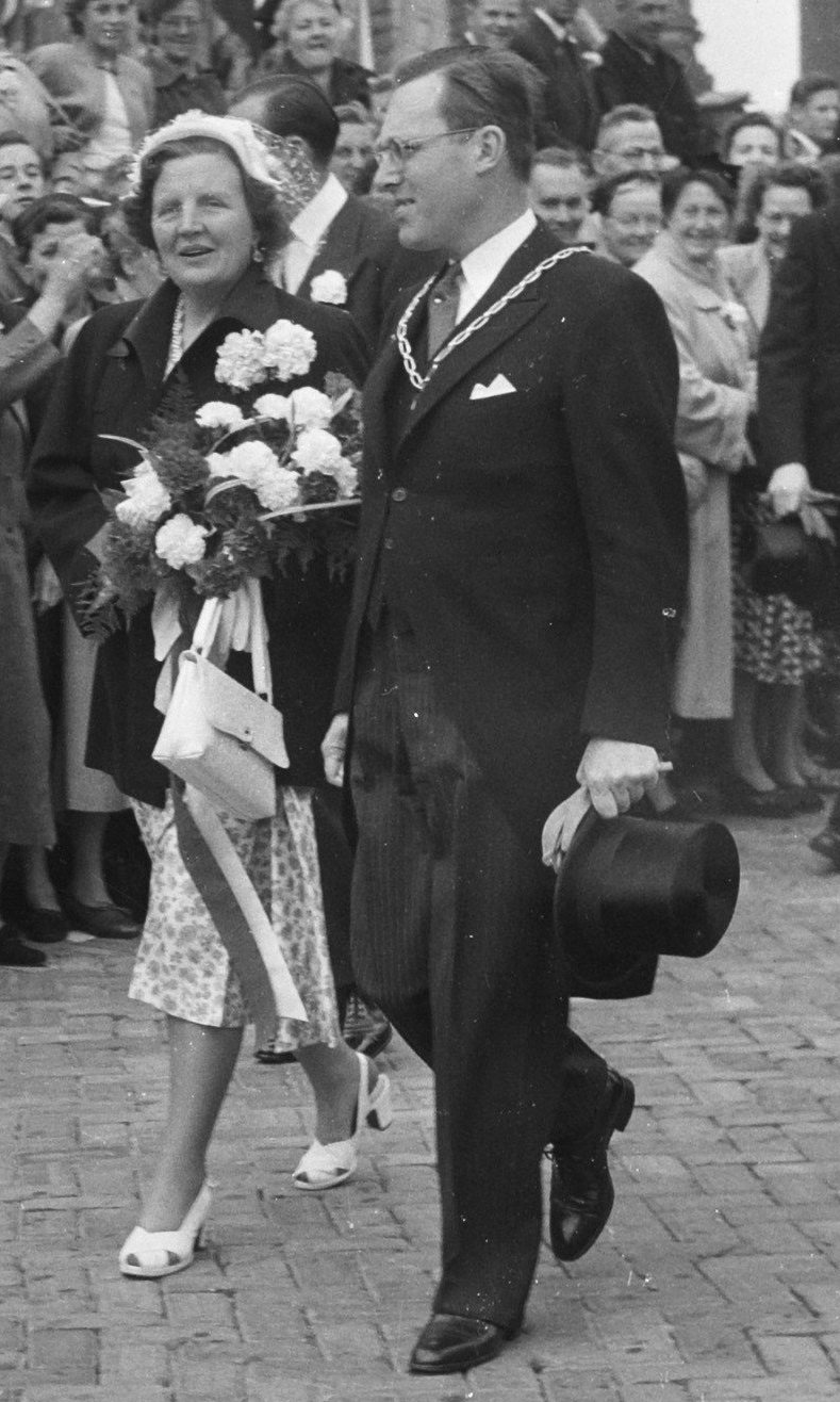 Collectie / Archief : Fotocollectie Anefo Reportage / Serie : [ onbekend ] Beschrijving : Koninklijk bezoek aan Noord-Holland Alkmaar Datum : 20 juni 1952 Locatie : Alkmaar, Noord-Holland Trefwoorden : bezoeken Fotograaf : Noske, J.D. / Anefo Auteursrechthebbende : Nationaal Archief Materiaalsoort : Negatief (zwart/wit) Nummer archiefinventaris : bekijk toegang 2.24.01.03 Bestanddeelnummer : 905-1752